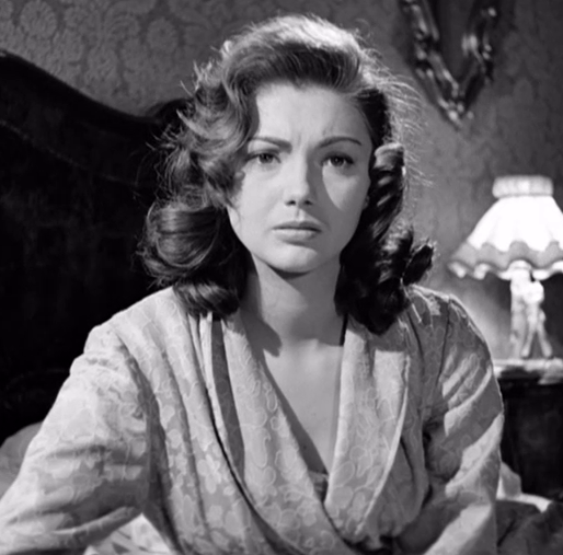 Sylva Koscina, screenshot da Il ferroviere catturato personalmente